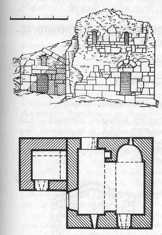 სურამის ციხის ეკლესიის გეგმა